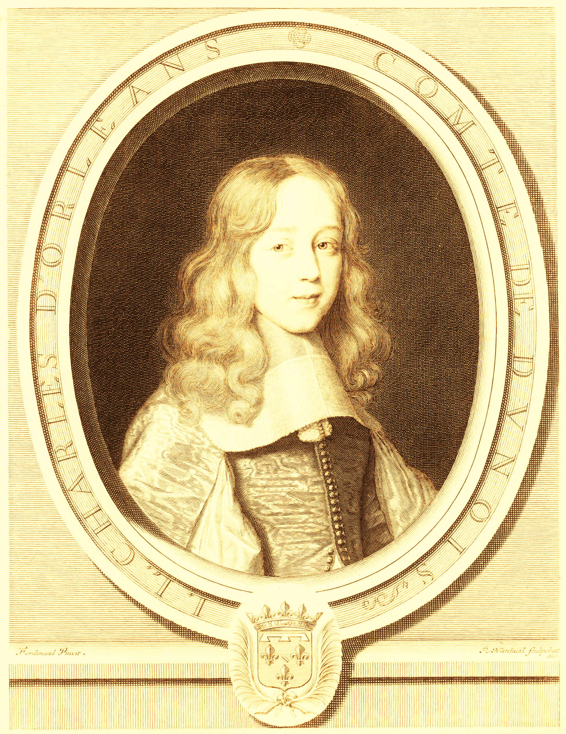 Jean Louis Charles d'Orléans-Longueville (image du domaine public modifiée)